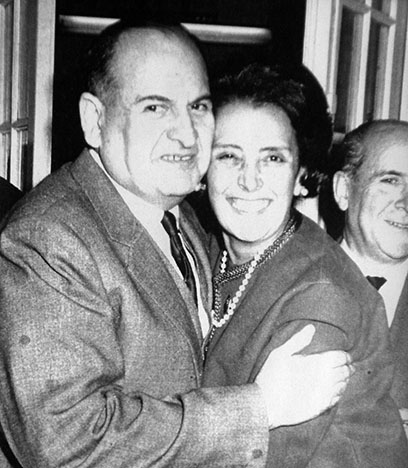 Emilio Jofré, gobernador electo de Mendoza, y su mujer celebrando la victoria del primero en las elecciones de 1966 (no llegó a asumir).